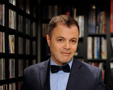 Γιώργος Παναγιωτίδης